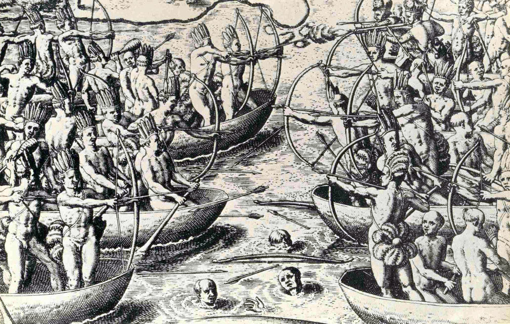 Gravura de Theodore de Bry, reproduzida da edição original de 1557 em Marburgo, Alemanha, do livro de Hans Staden, Duas Viagens ao Brasil.